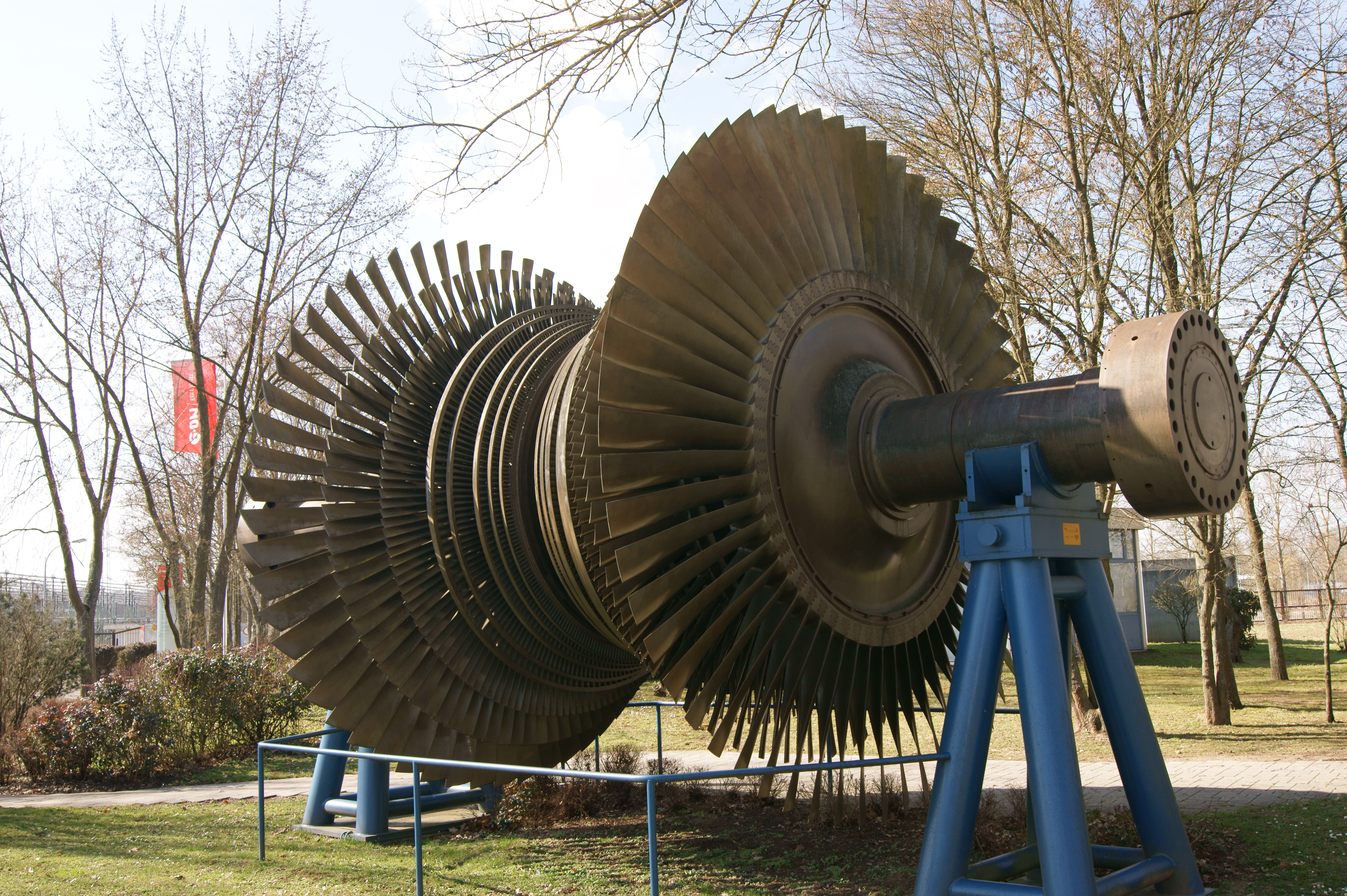 Die Turbine steht außerhalb vom Kraftwerk Grafenrheinfeld.